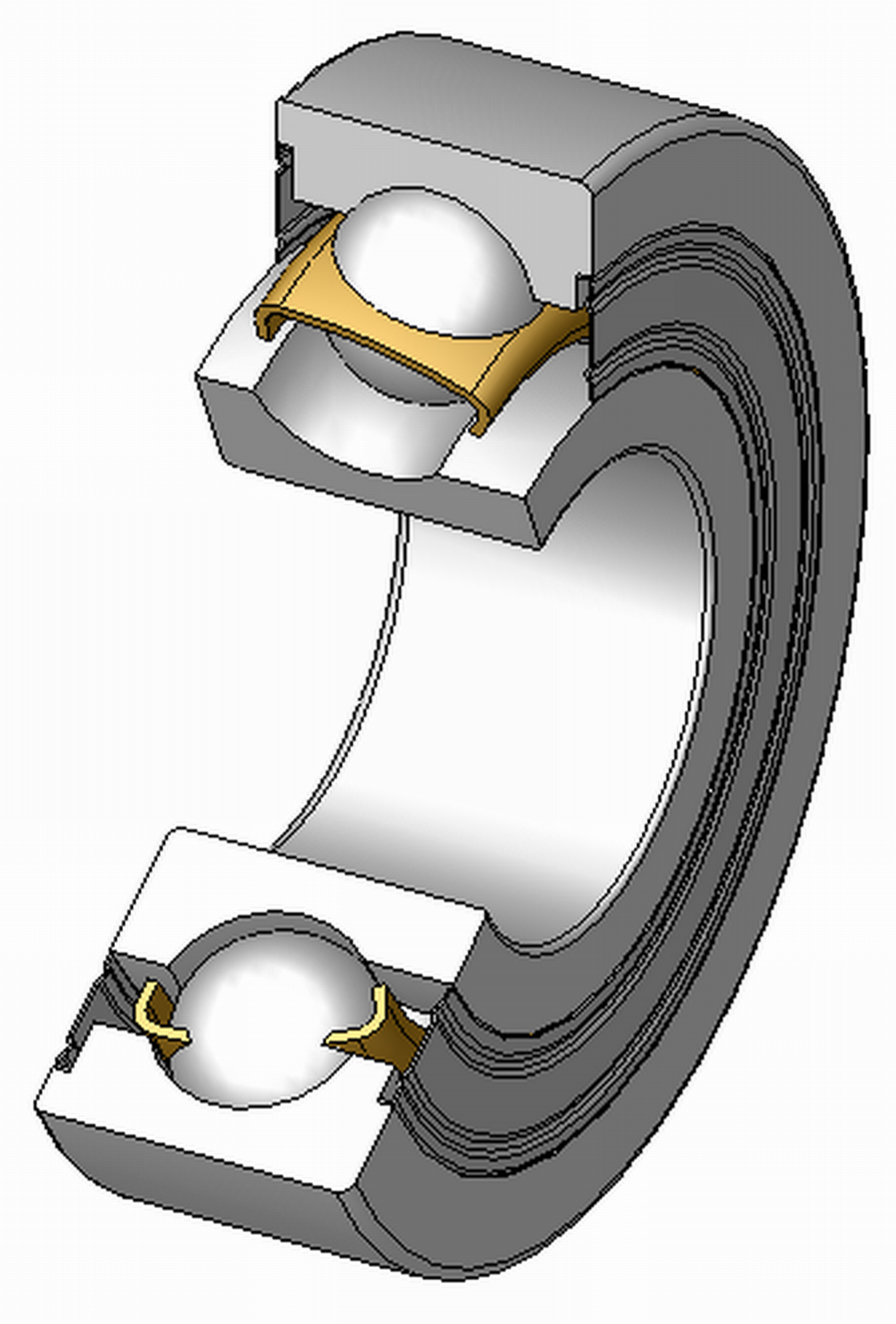 Vierpunktlager, Blechkäfig aus Messing, beidseitigen Deckscheiben, 120°Schnitt, Hinweis: Innenaufbau des Lagers (insbesondere des Kaefigs) variiert je nach Hersteller und Baugroesse rolling contact bearings